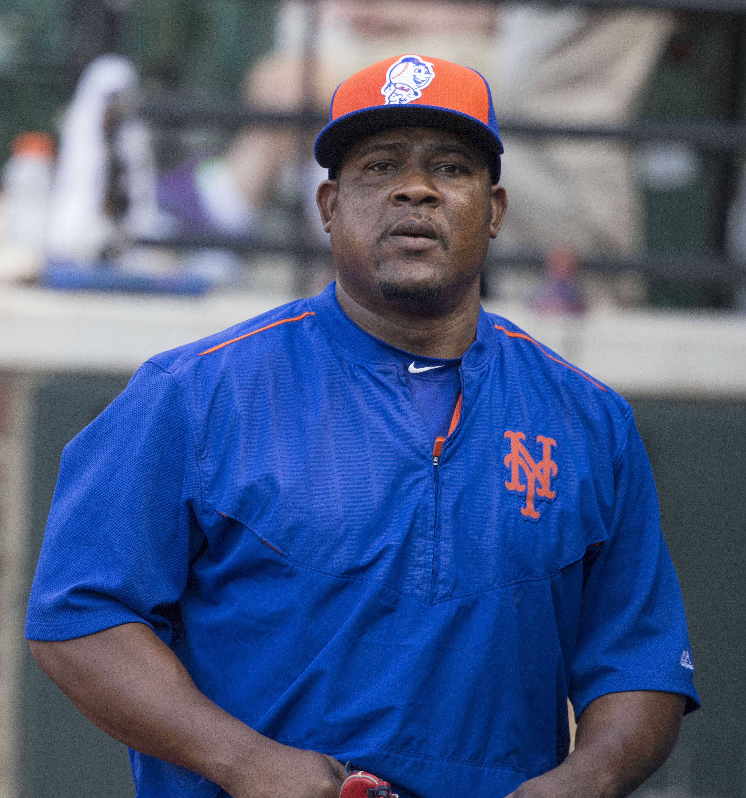 Juan Uribe